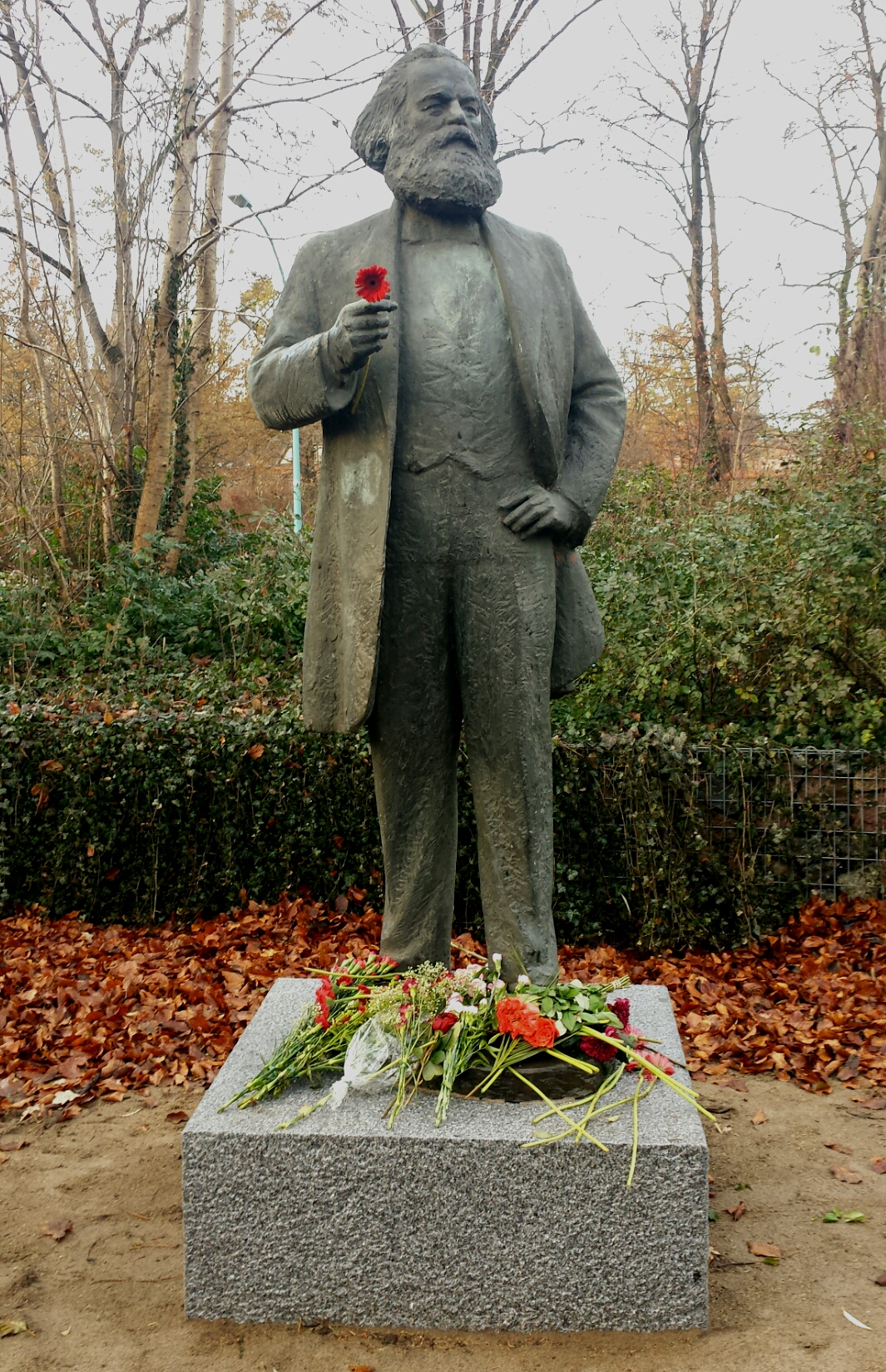 Karl-Marx-Denkmal von Gerhard Thieme im Park Schwanenteich in Neubrandenburg. Das Denkmal wurde 1969 auf dem Marktplatz (damals Karl-Marx-Platz) aufgestellt, 1995 versetzt und 2001 eingelagert. 2018 wurde es an seinem neuen Standort im Park Schwanenteich am südlichen Friedrich-Engels-Ring wieder aufgestellt.